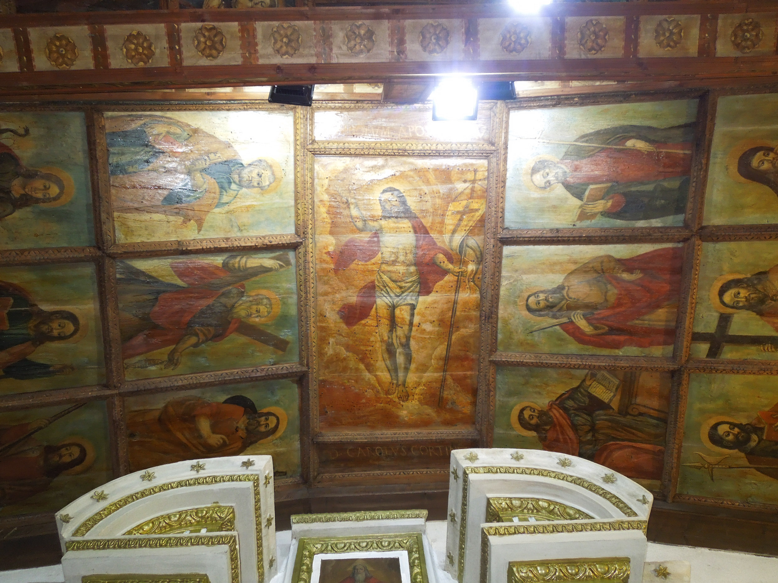 Particolare della quinta campata del soffitto ligneo dipinto della chiesa di San Bartolomeo di Villa Popolo in provincia di Teramo.